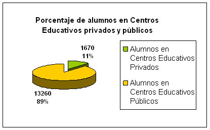 Porcentaje de alumnos en Centros Educativos privados y públicos en Huancavelica